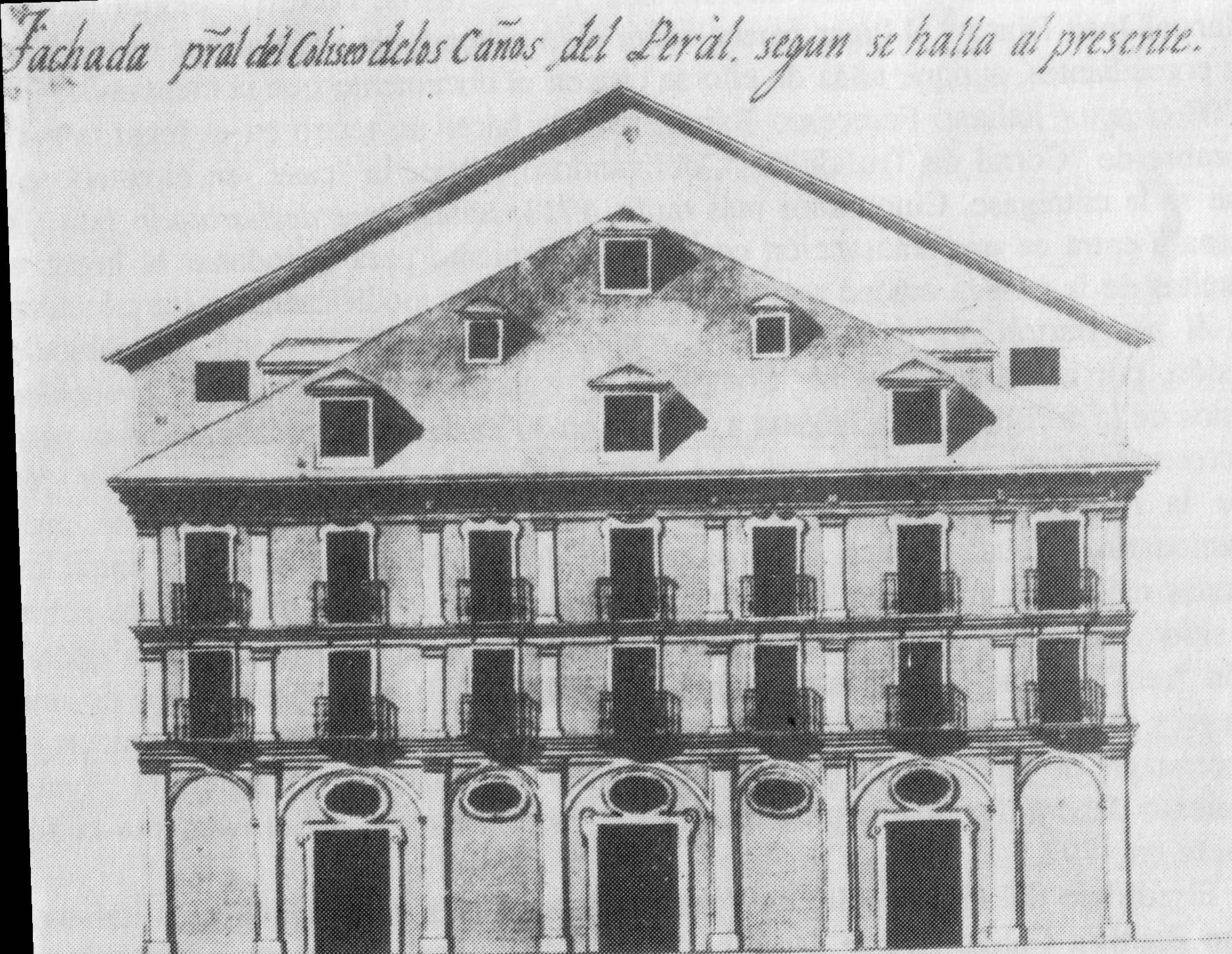 Dibujo del arquitecto Francisco Sánchez. Fachada del Coliseo de los Caños del Peral, en 1788. Madrid.